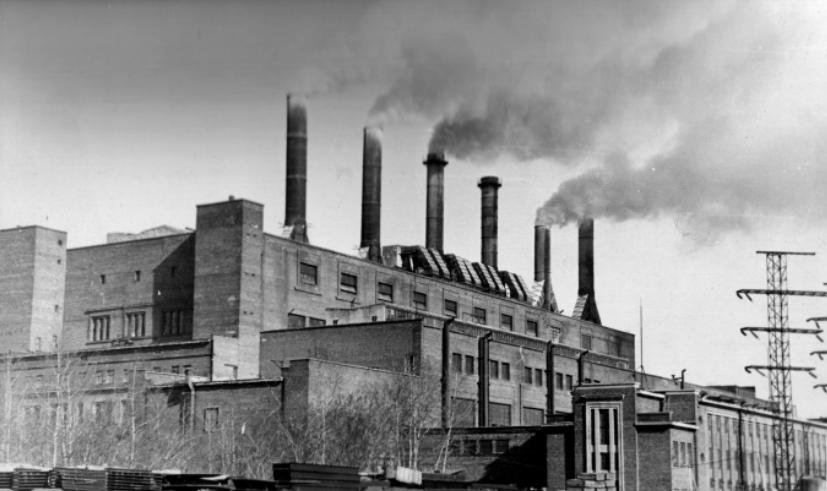 Новосибирская ТЭЦ-3 в первой половине 20 века. Вид с Большой улицы.